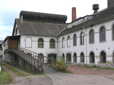 Wadgassen, ehem. Kristallfabrik Villeroy & Boch